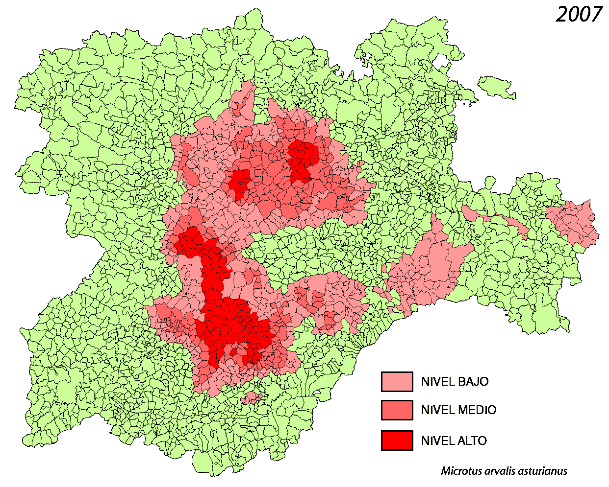 Mapa de dispersión de los topillos (Microtus arvalis asturianus) durante la pplaga que afectó a Castilla y León en el año 2007. Los datos corresponden al mes de julio. Fuente Junta de Castilla y León, Instituto Tecnológico Agrario.